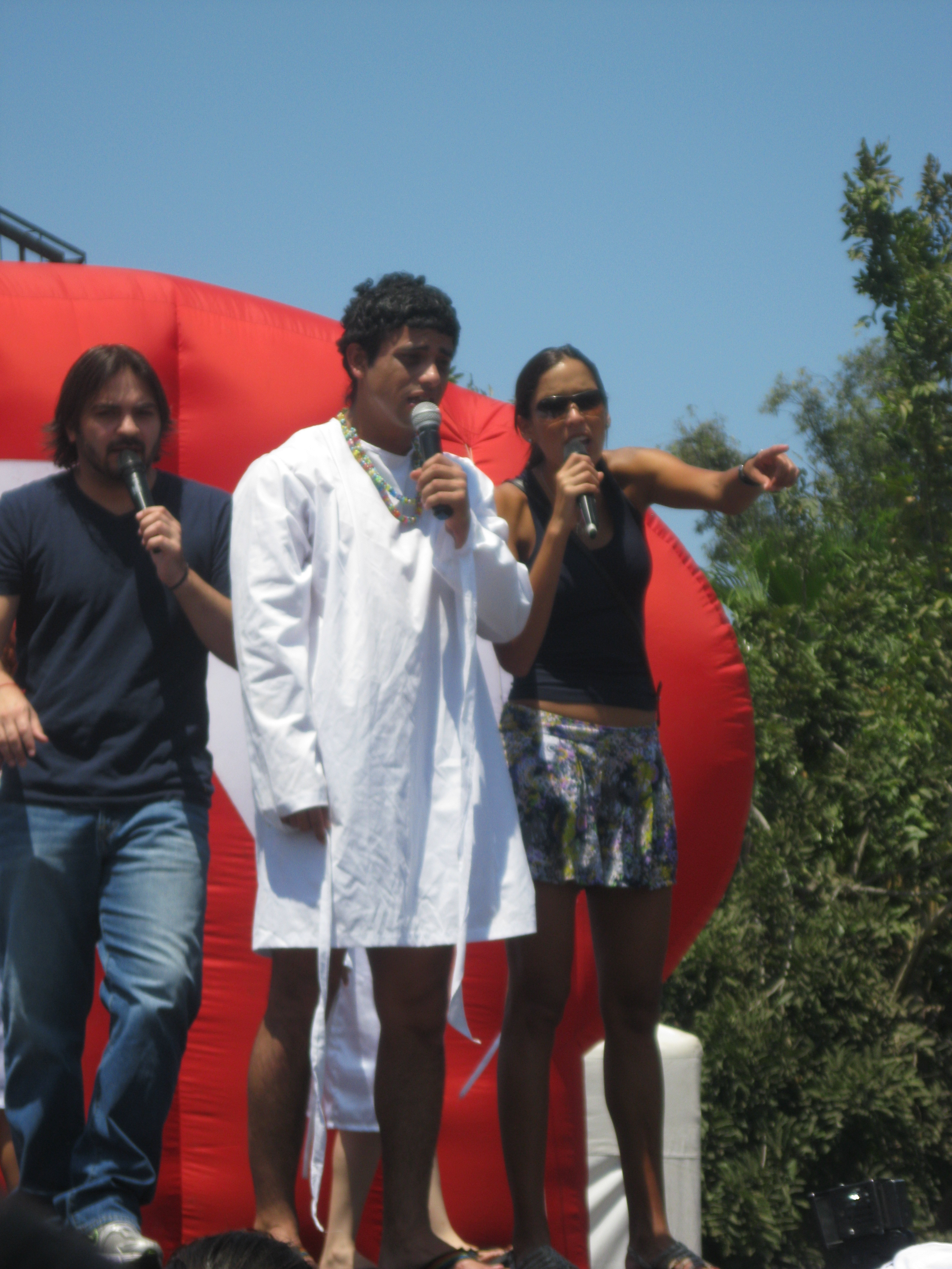 Diego Spotorno, Efraín Ruales y María Teresa Guerrero como parte de En Contacto en 2012. Presentándose al aire libre en el parque Forestal, al sur de la ciudad de Guayaquil.